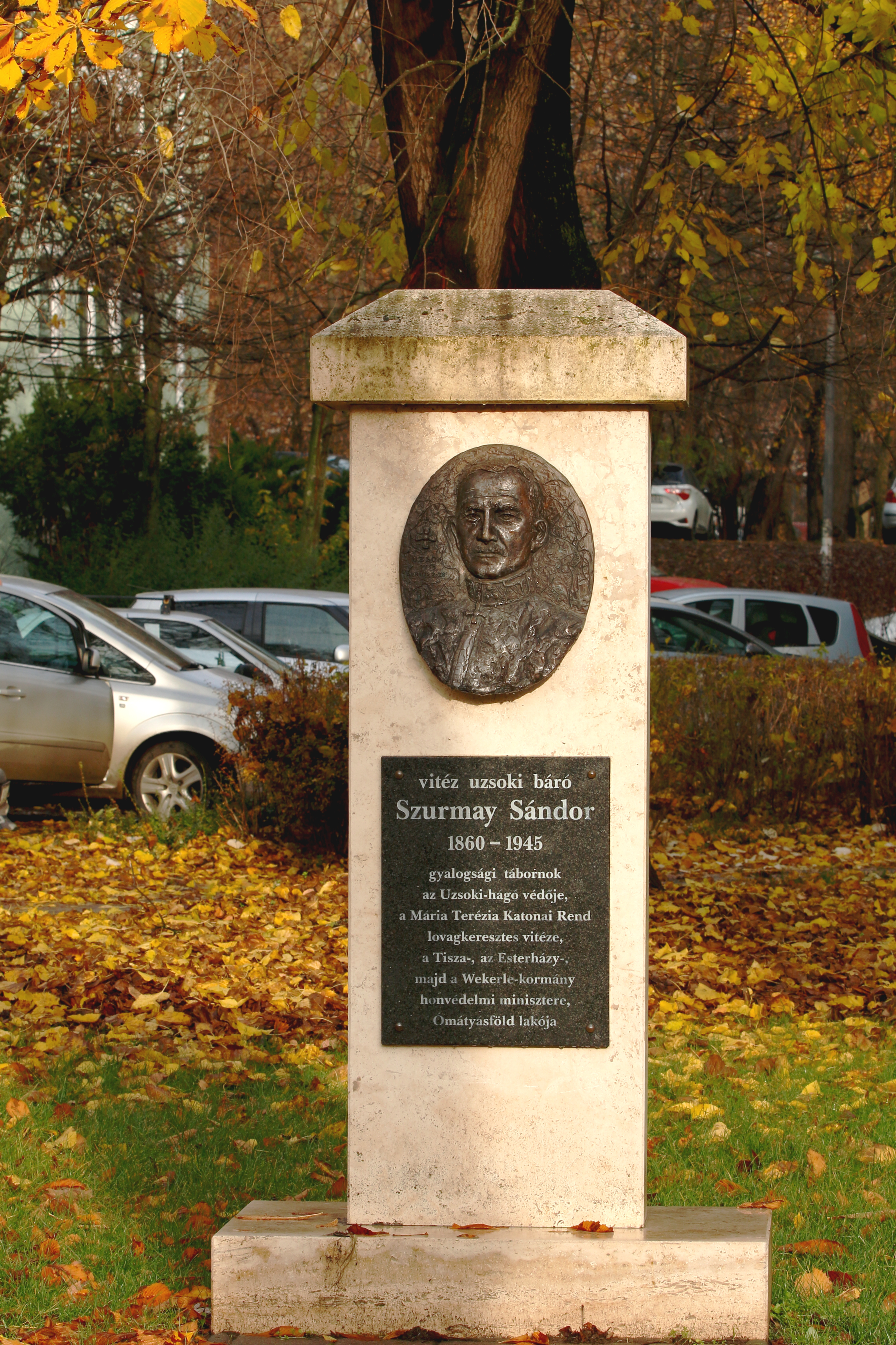 Vitéz uzsoki báró Szurmay Sándor emlékműve Ómátyásföldön